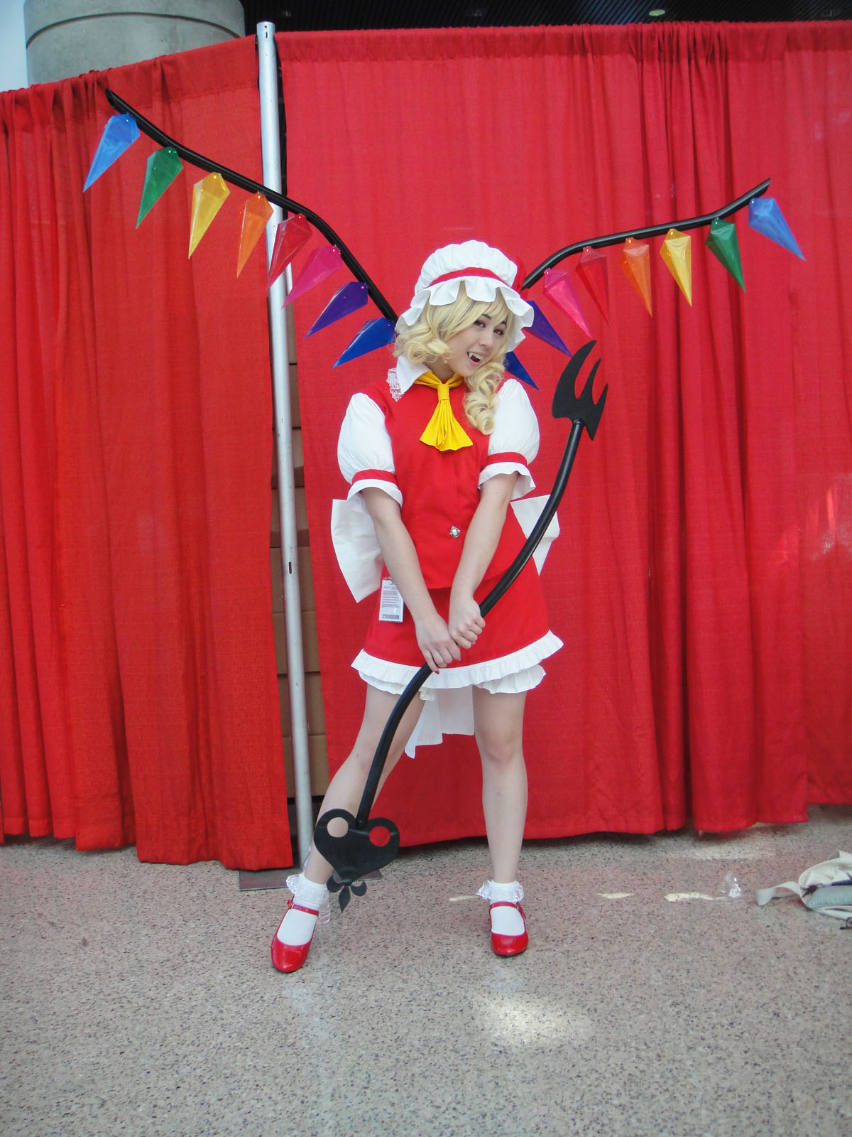 Anime Expo 2011